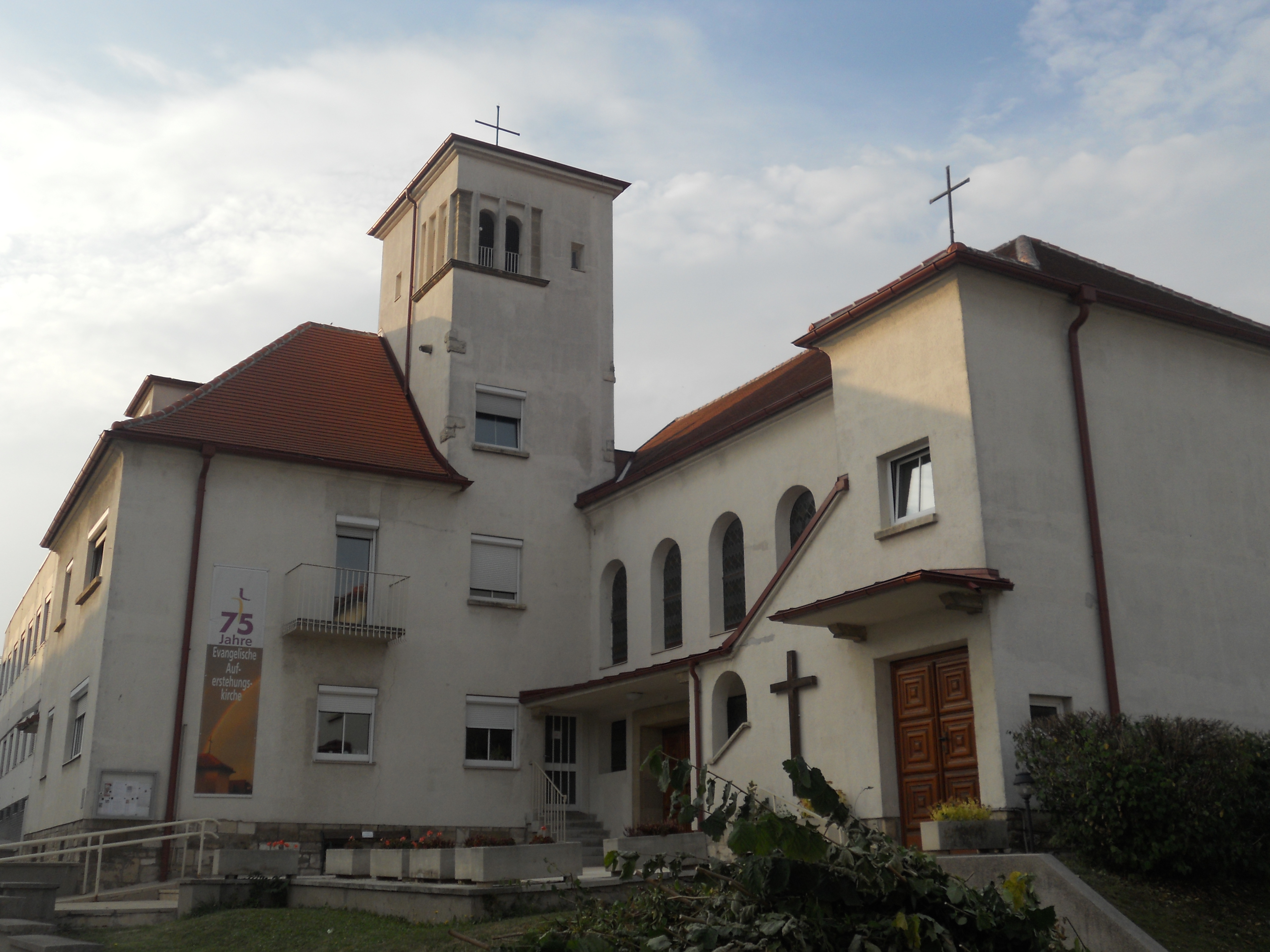 Evang. Pfarrkirche A.B., Ev. Betsaal und Pfarrhaus, St.-Rochus-Straße 1 in Eisenstadt